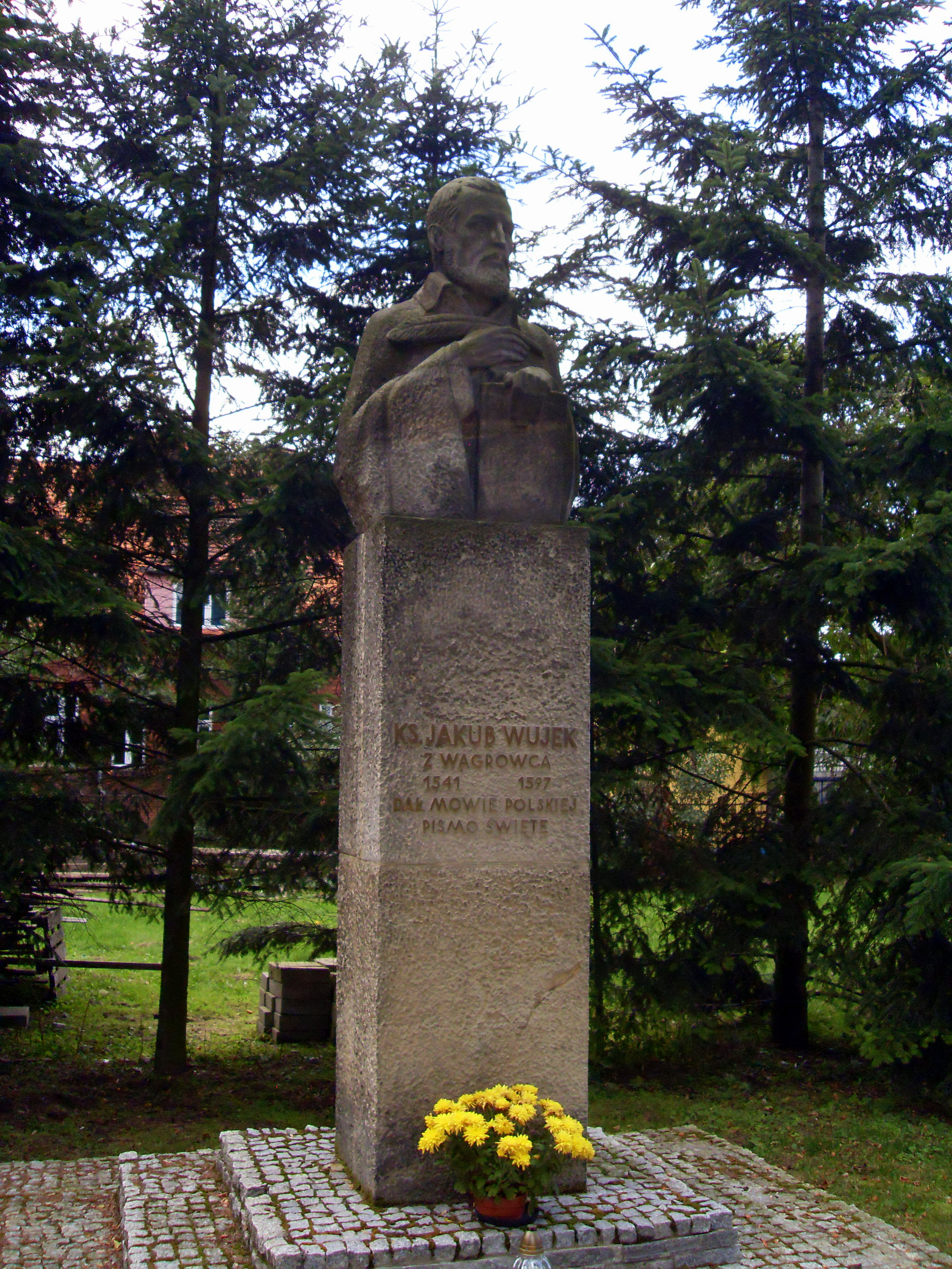 Pomnik Jakuba Wujka w Wągrowcu.